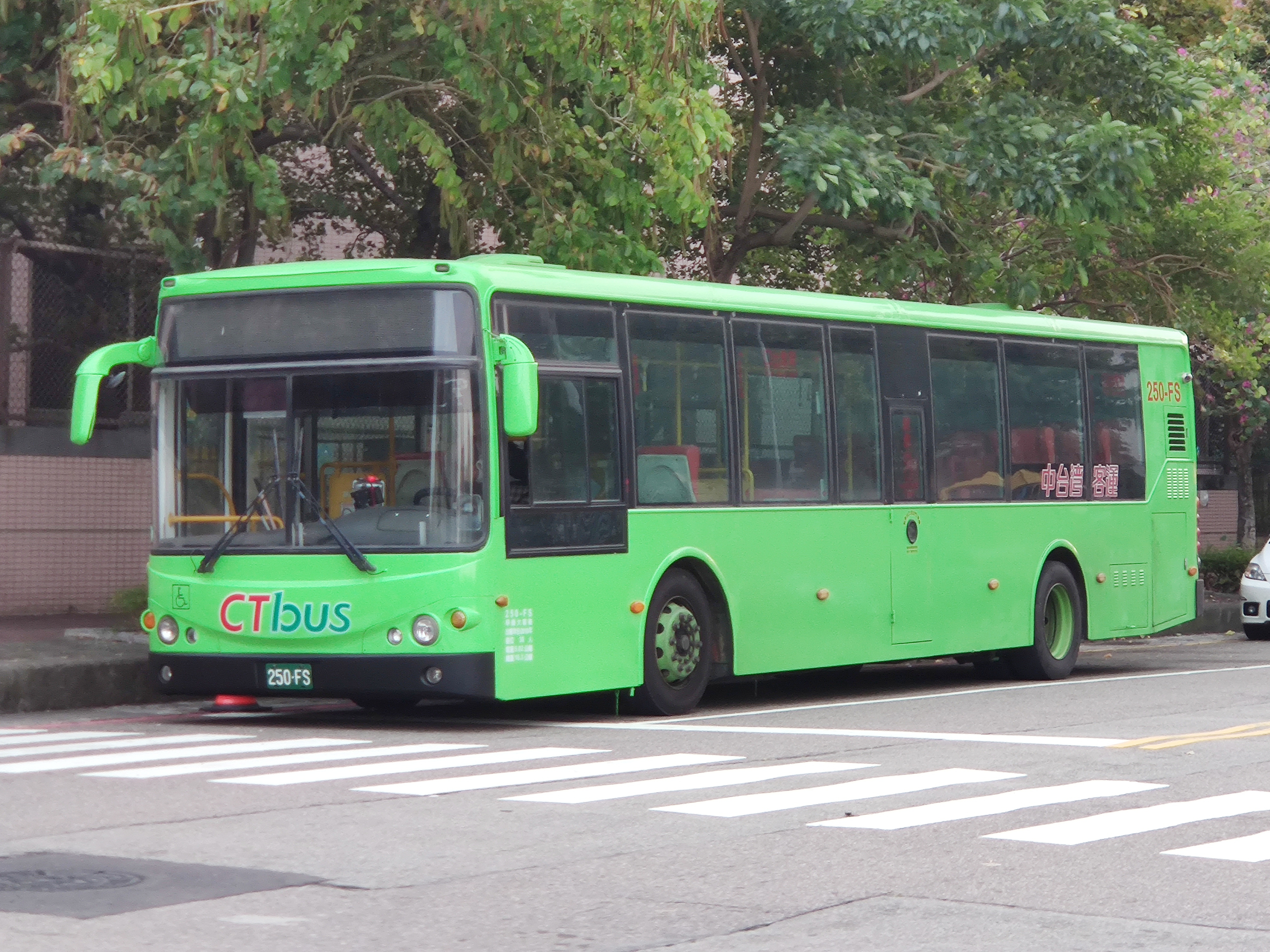 統聯客運 中興金龍KL6120U1大客車 250-FS